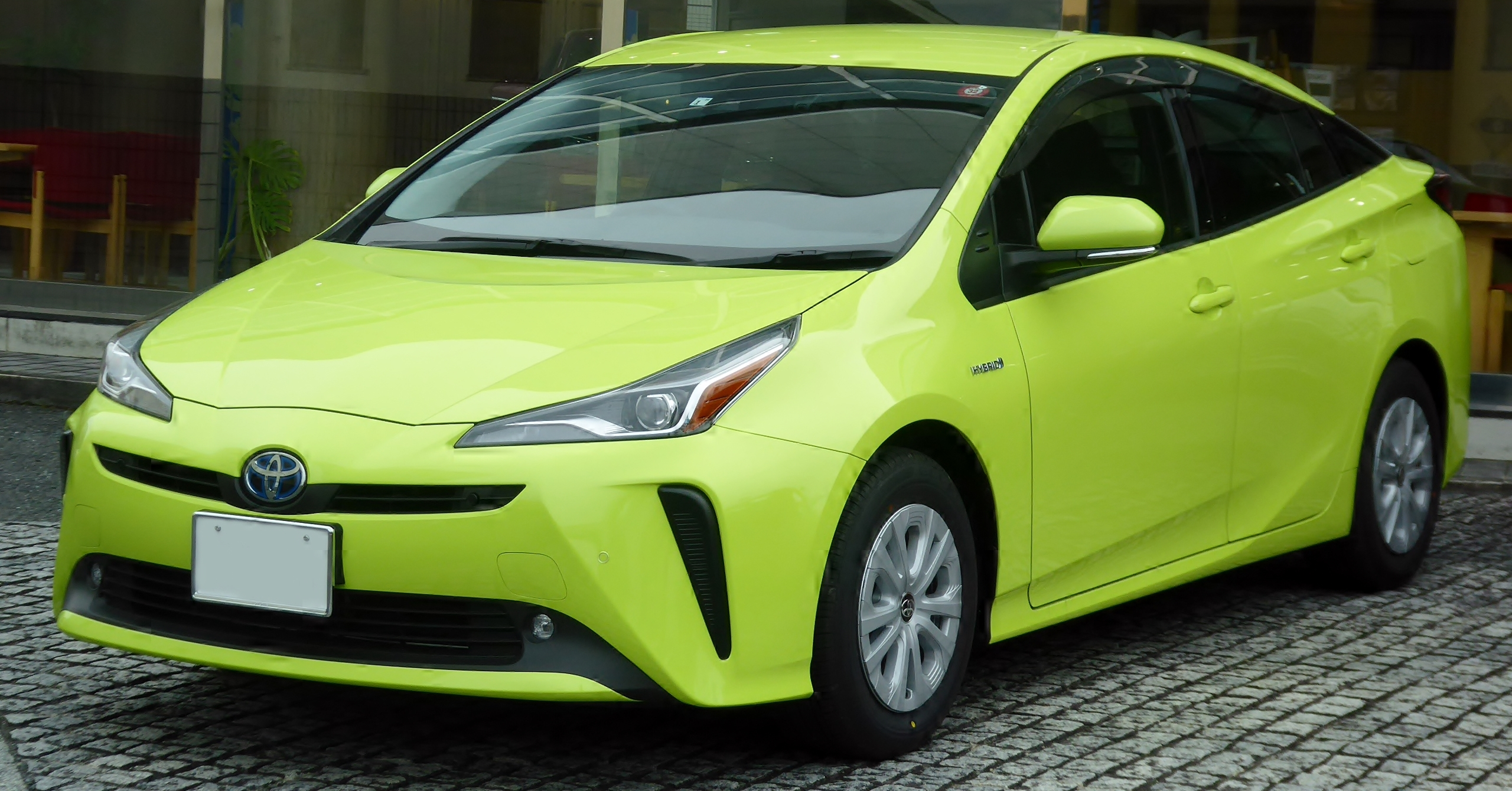 DAA-ZVW51-AHXEB型トヨタ・プリウスS 2WDを撮影。